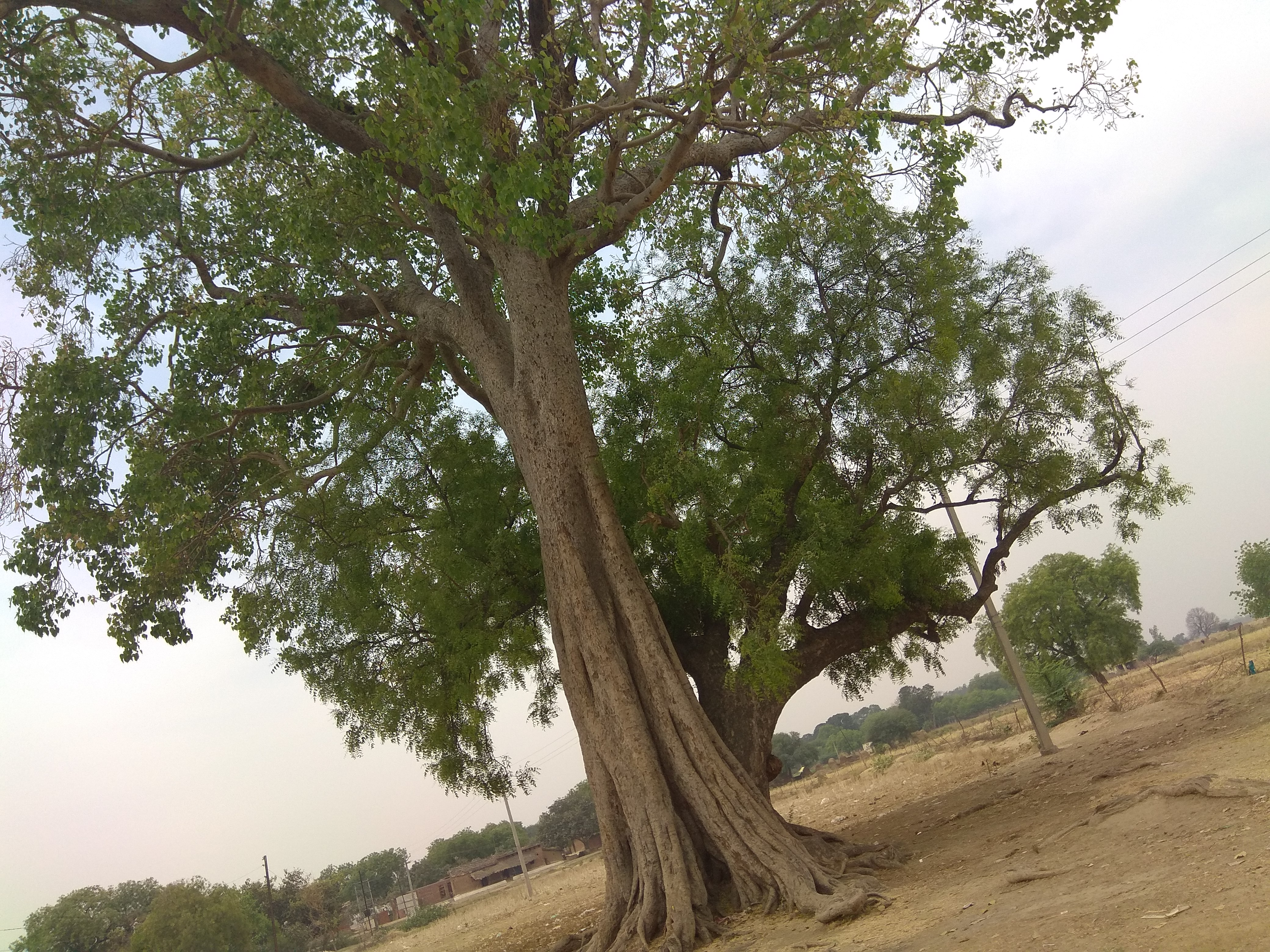 मन्दिर के पास विशाल पेड़